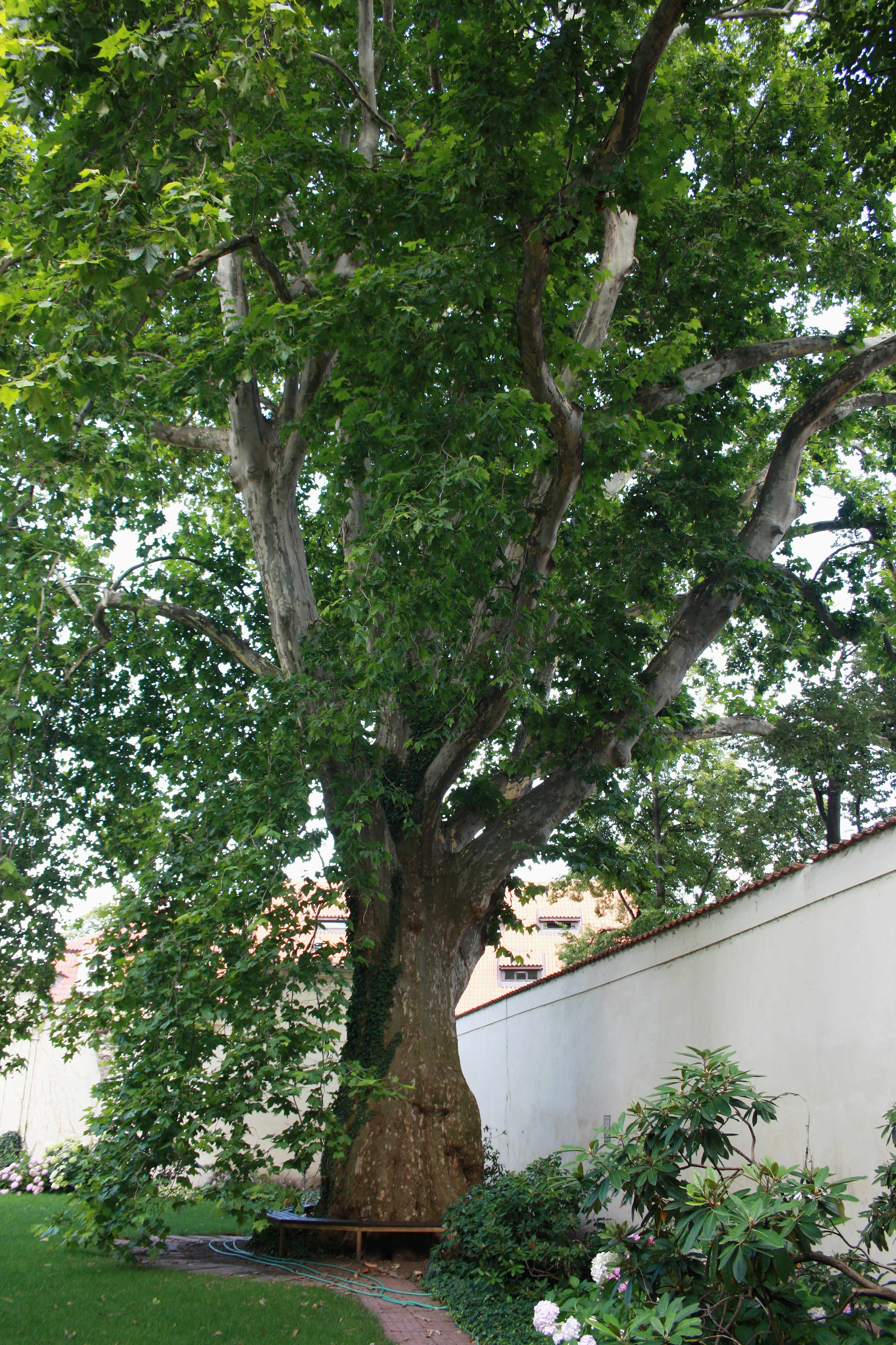 Praha, Malá Strana - Beethovenův platan v zahradě Velkopřevorského paláce